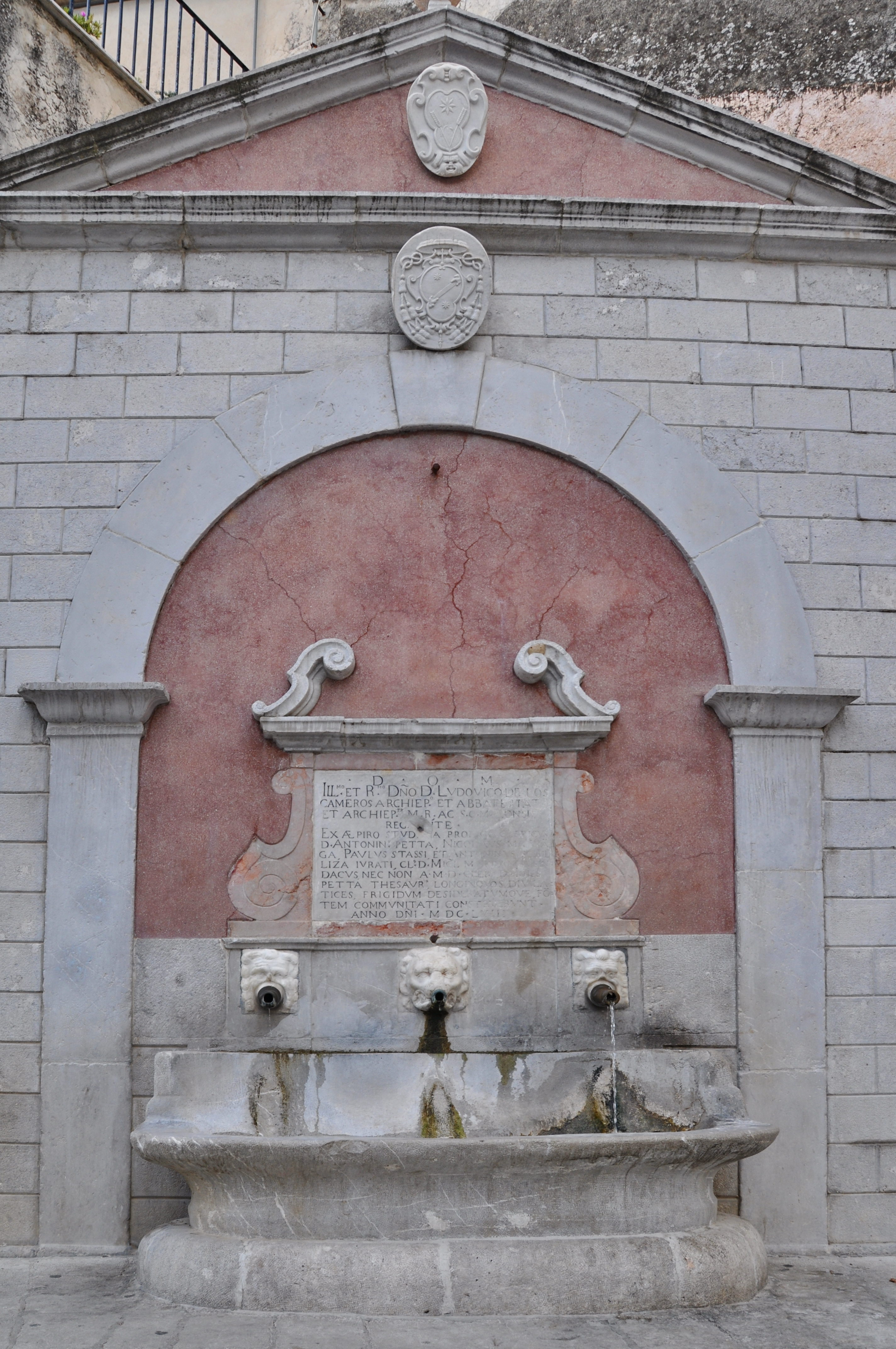 Kroi i Tre Kanojvet (Fontana dei Tre Cannoli), in Piazza Grande (Piazza Vittorio Emanuele), tipica fontana secentesca. Riporta sulla parete una lapide del 1659, la fontana venne costruita per la prima volta nel 1608 da un architetto arbëresh. Qui per L'Epifania si rievoca il battesimo di Gesù nel Giordano.